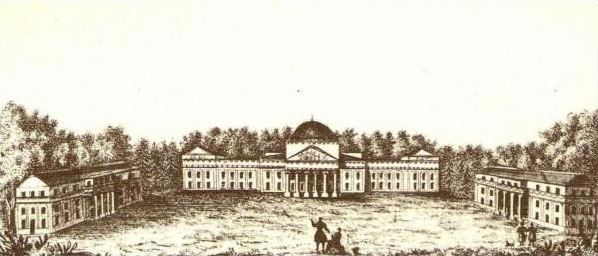 Беларуская (тарашкевіца): Вільня, Веркі